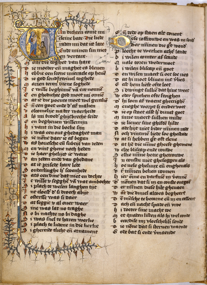 Beatrijs